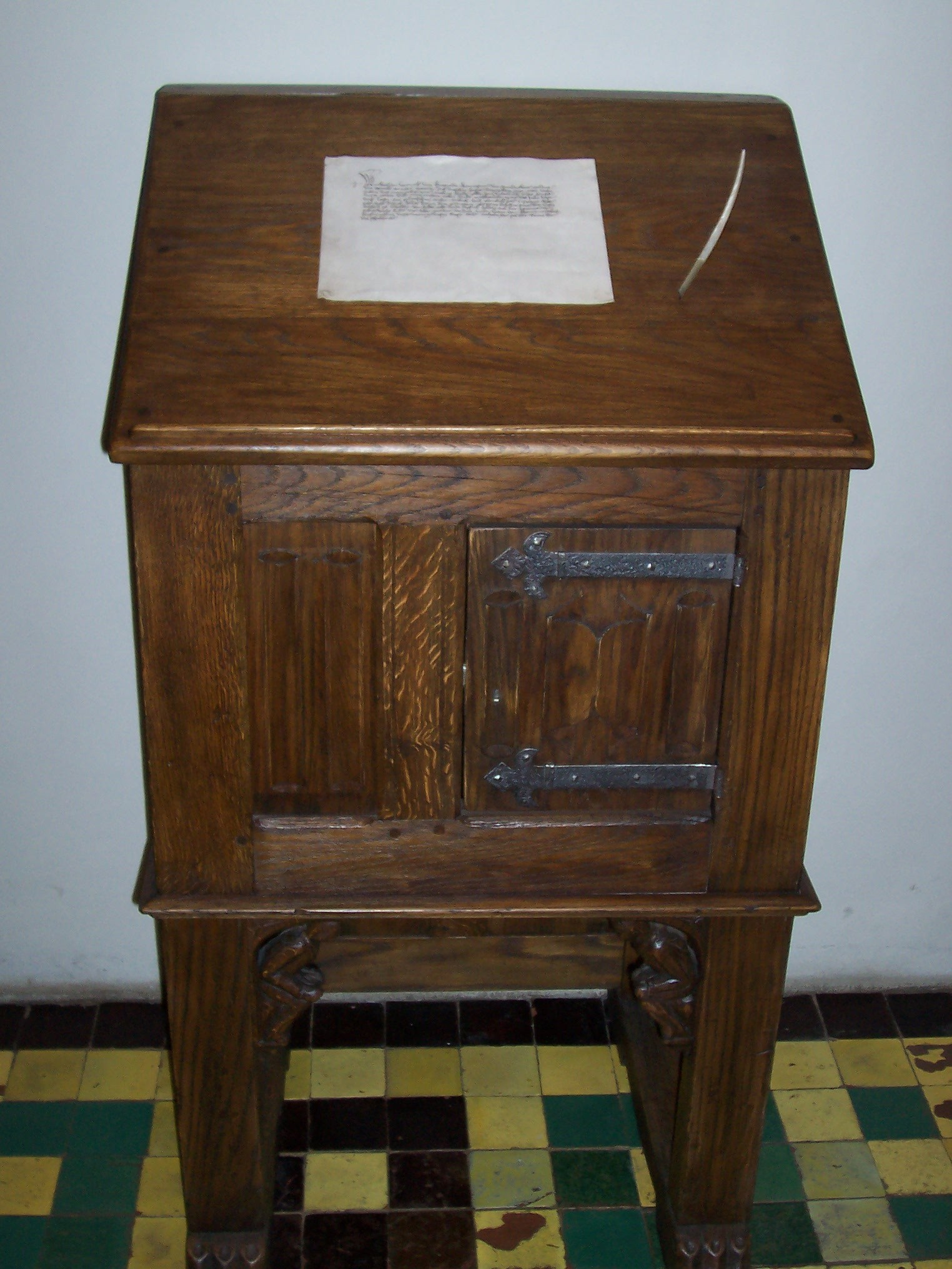 Pulpit (Scriptorium) - zamek w Malborku